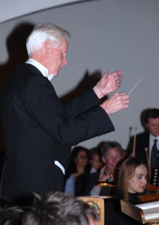 Dirigent Arnulv Hegstad